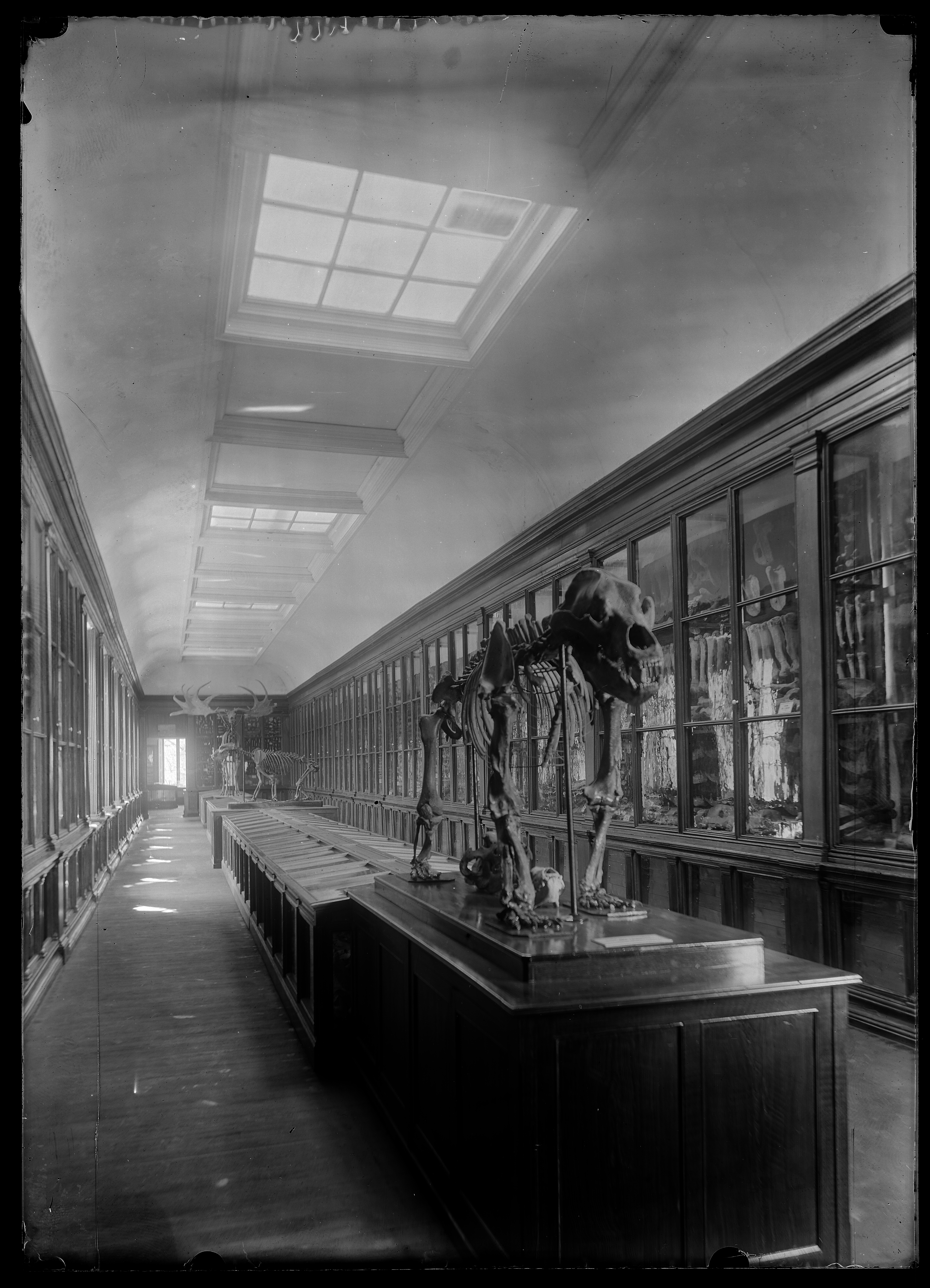 Inscription manuscrite par Eugène Trutat sur l'enveloppe : " Musée de Toulouse : galerie des cavernes "